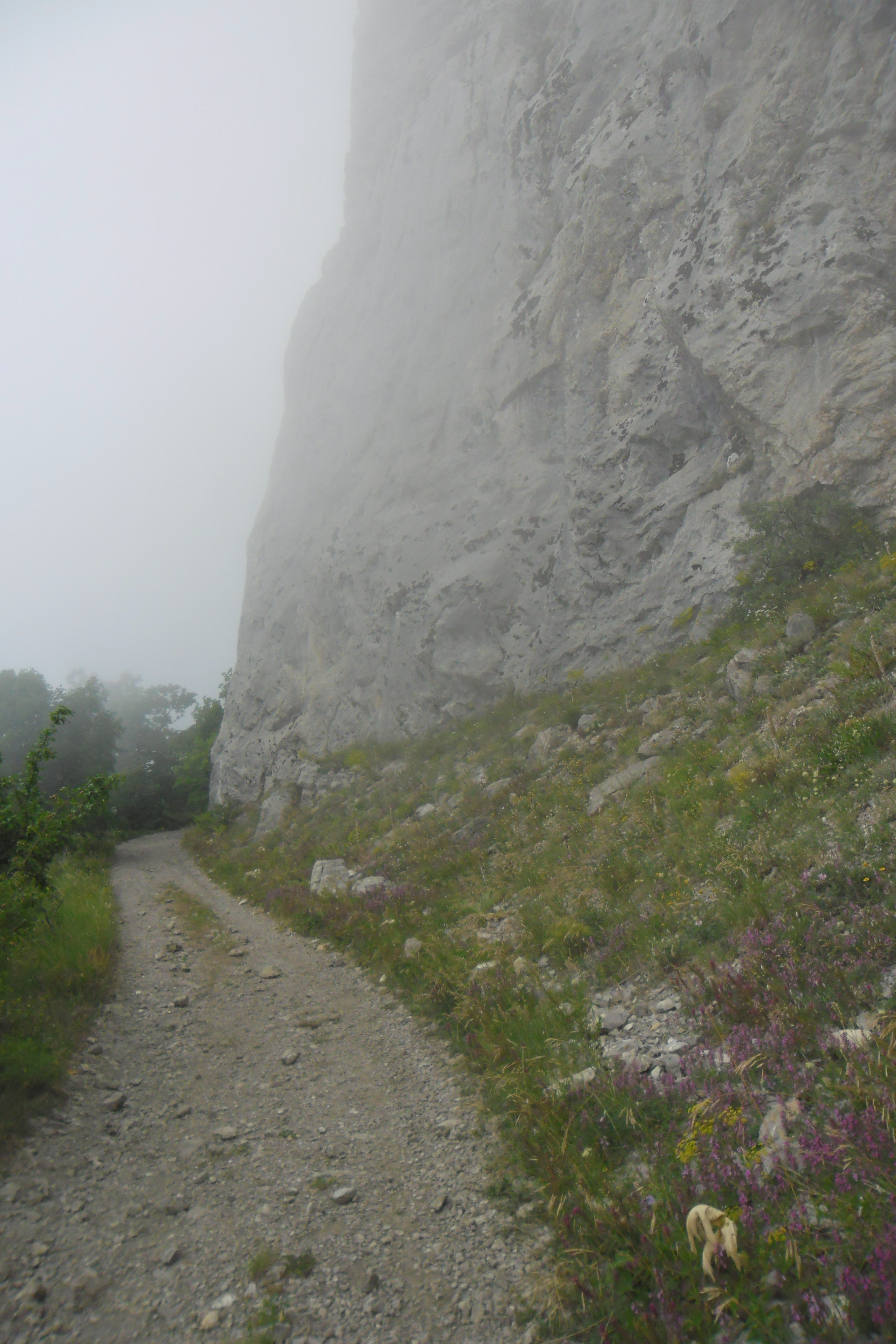 Фото